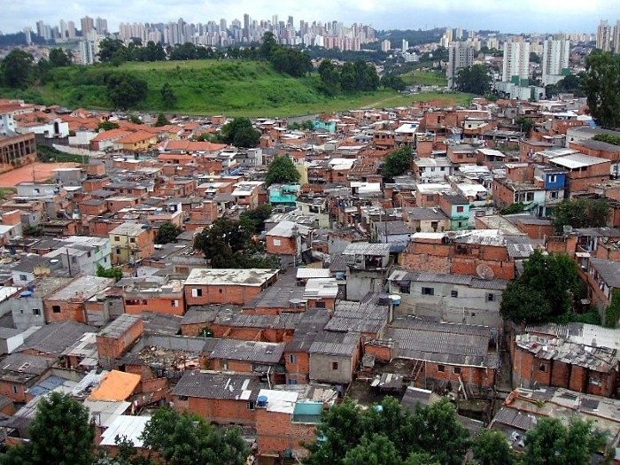 Vista da Favela Jaqueline, no distrito de Vila Sônia (São Paulo, Brasil)